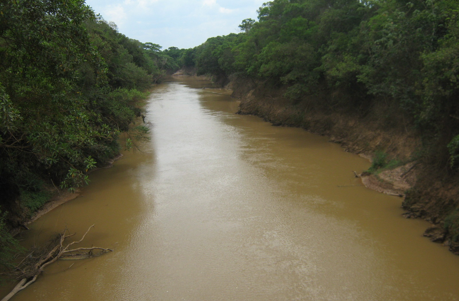 Próximo ao distrito de Pilar pertencente a Patos de Minas.